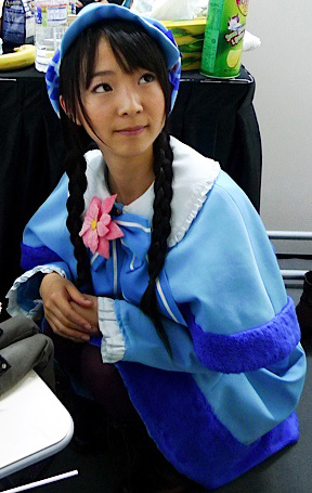 Izumi Kitta